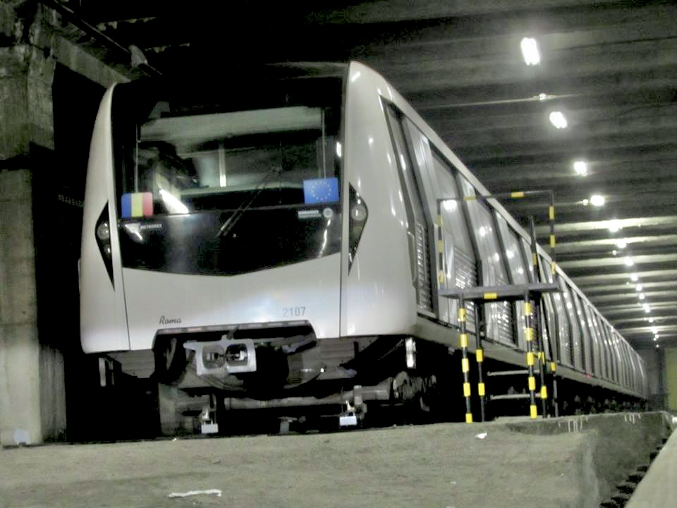 Trenul 1107-2107 Roma in Depoul Metrorex Berceni dupa o zi grea de munca!